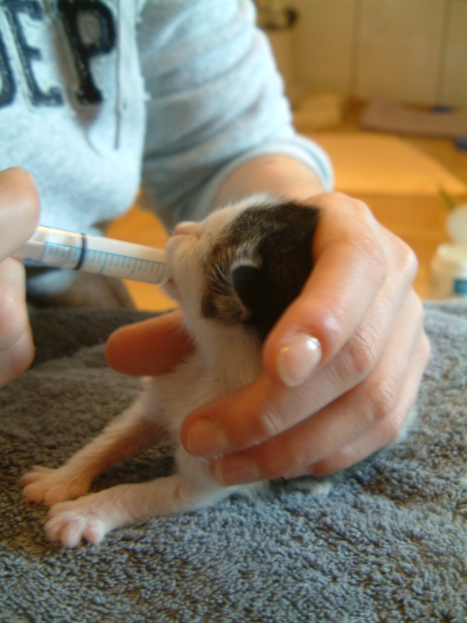 Feeding Kasimir (3 days old, 126 gramm)